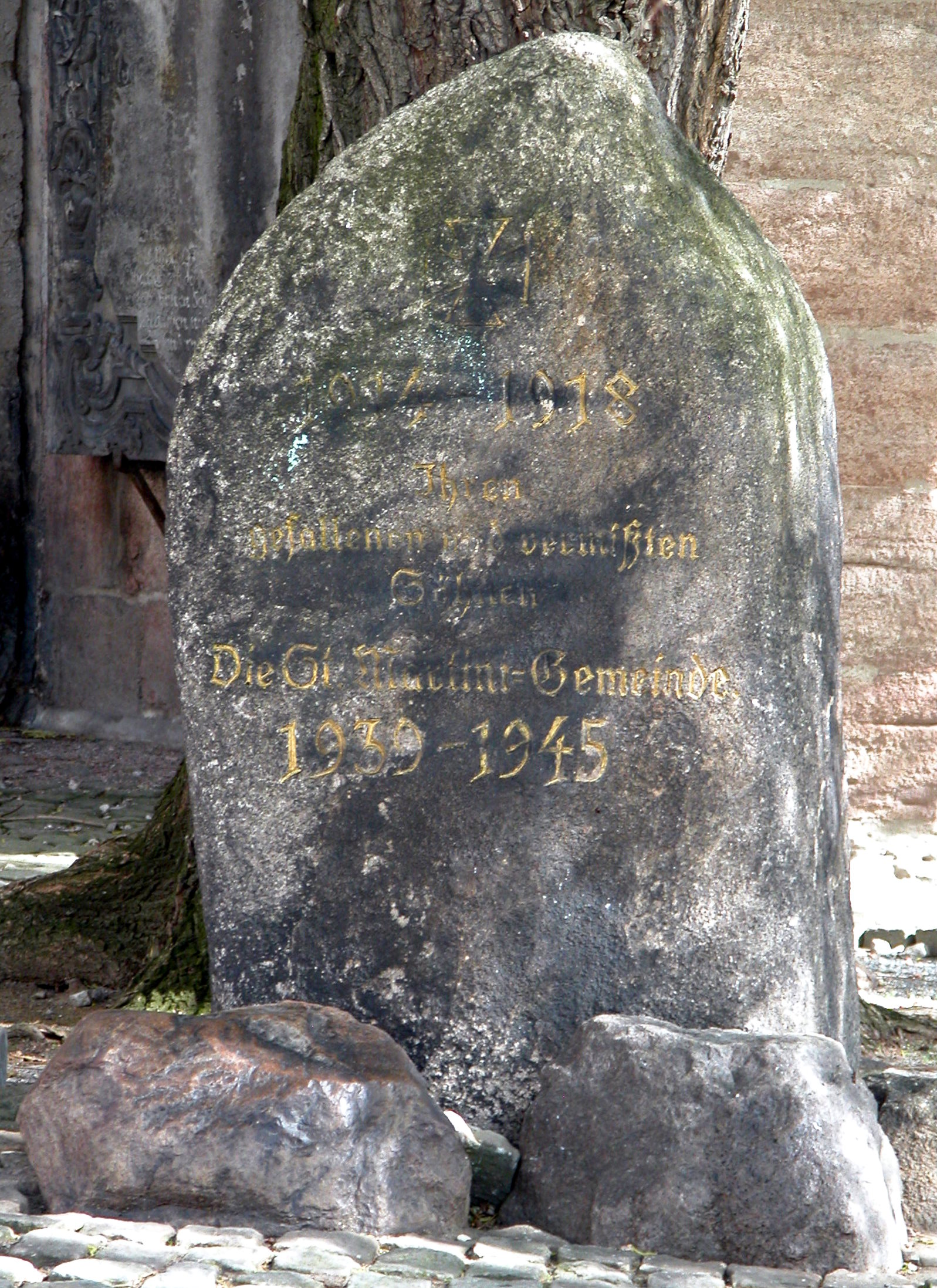 Braunschweig: Gedenkstein für die im Ersten Weltkrieg (1914–1918) und im Zweiten Weltkrieg (1939–1945) Gefallenen der Martini-Gemeinde., Südseite der Martinikirche.